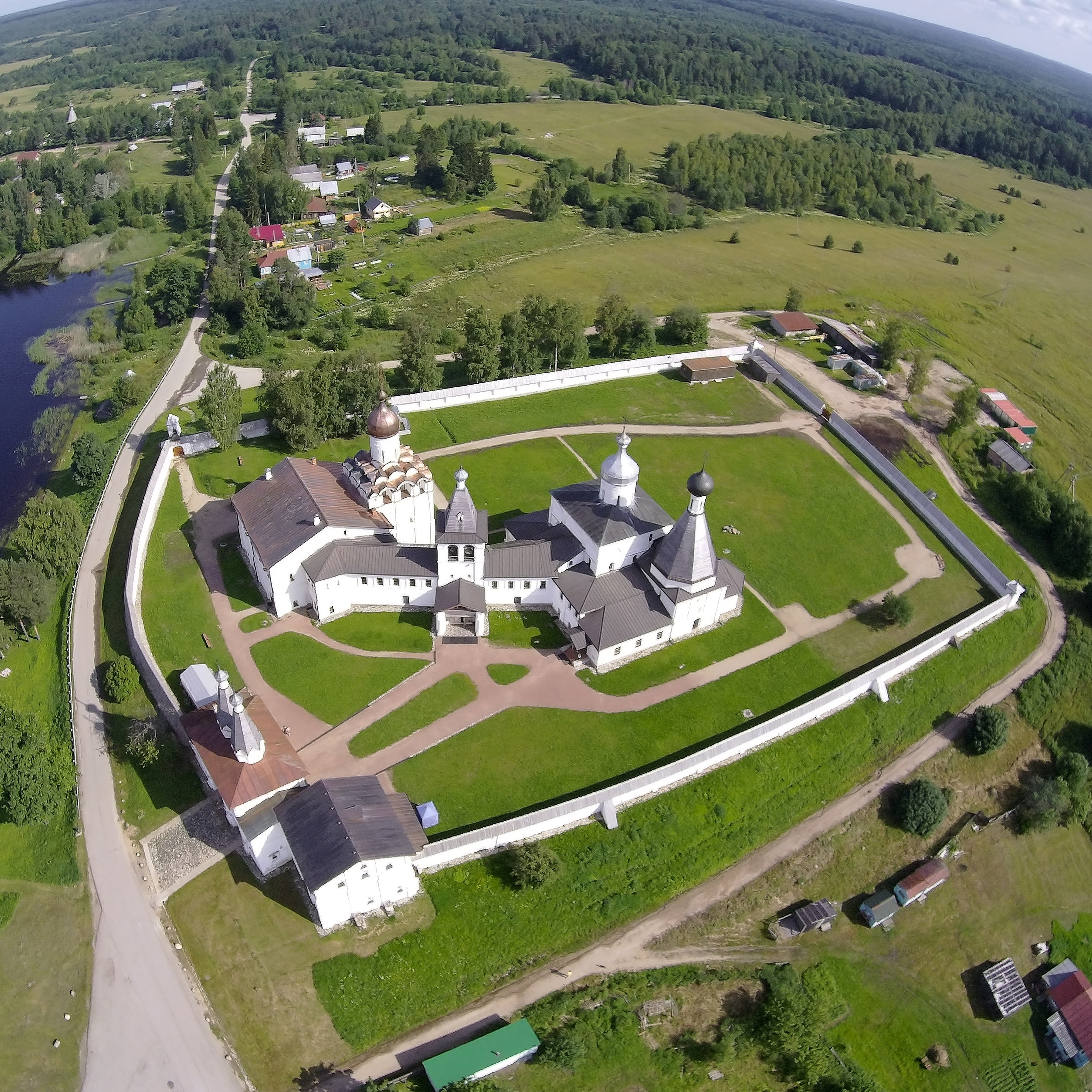 Ферапонтов Белозерский монастырь